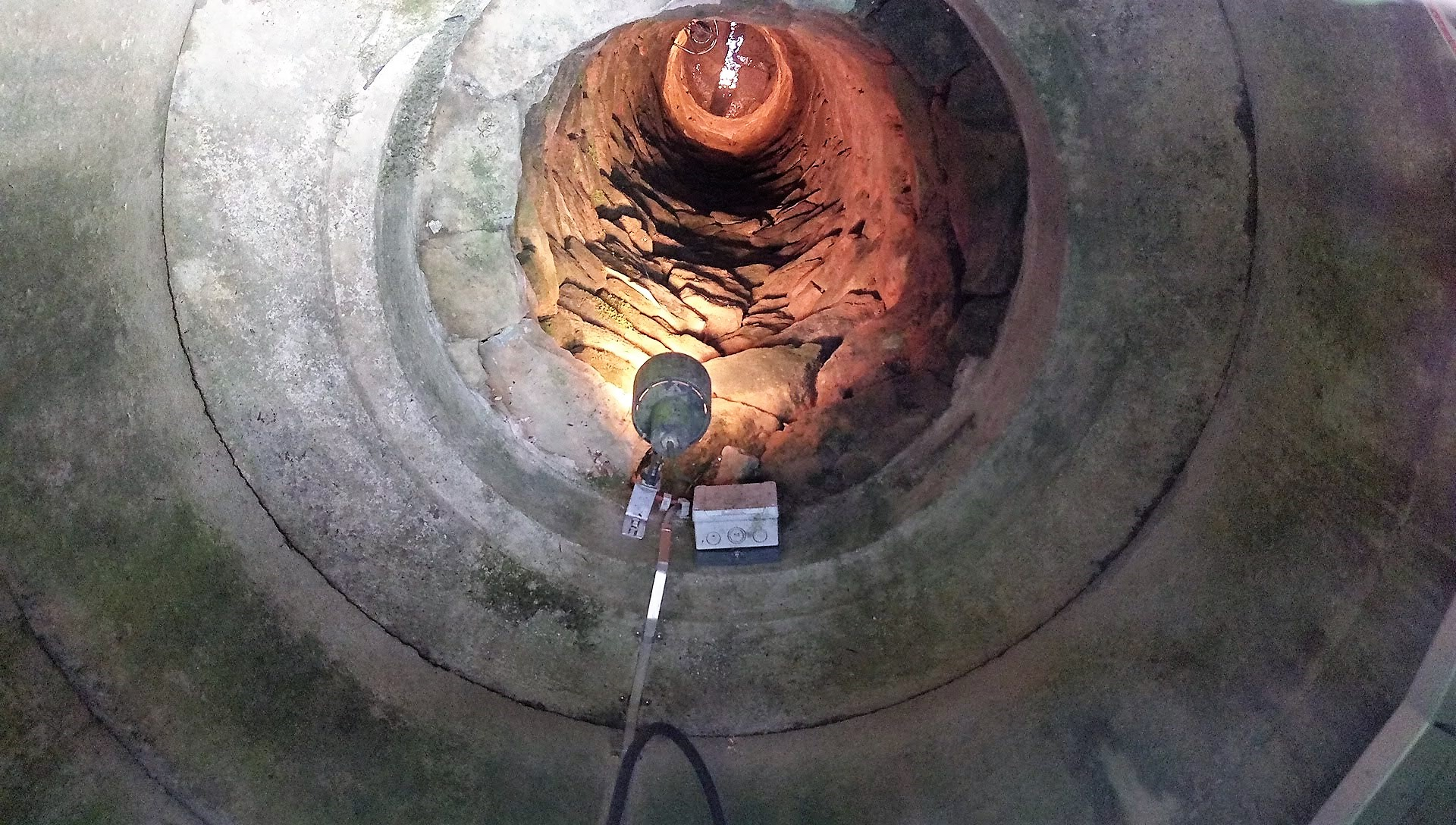 Walferdange, Grünewald: vue intérieure du Puits -4 des "Raschpëtzer", série de puits disposés en ligne, réalisée suivant la technique du qanat perse.